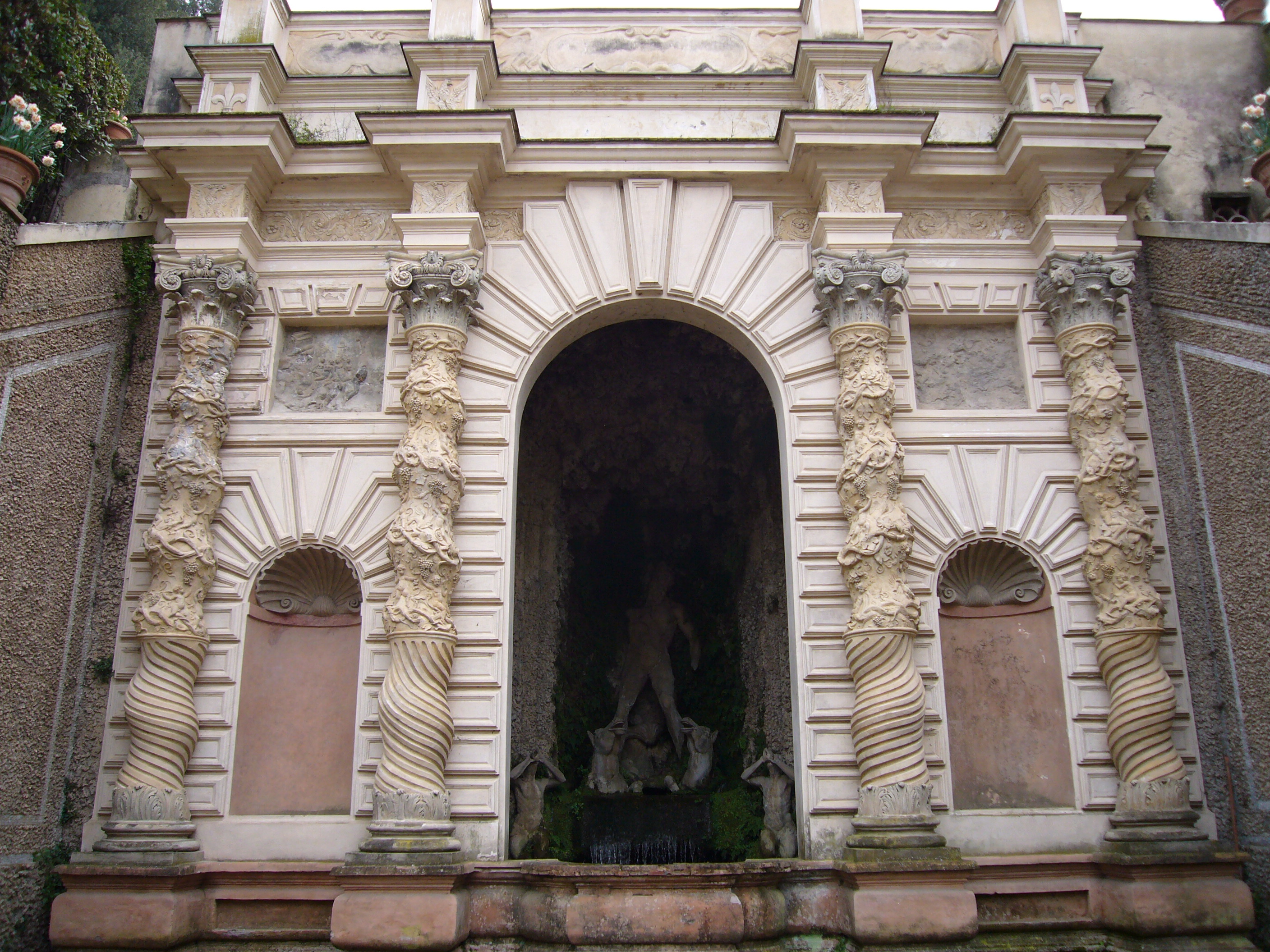 Tivoli, Villa d'Este: fontana di Proserpina